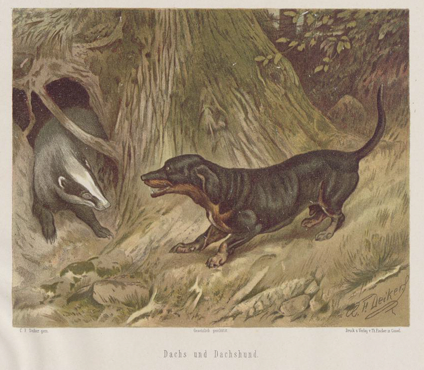 Chromolithographie aus der Serie "Jagdbare Thiere" von Carl Friedrich Deiker Dachs und Dachshund